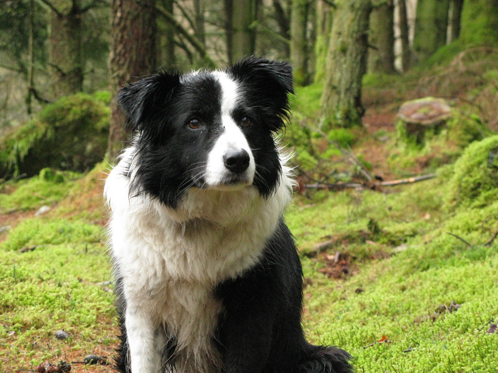 A Border Collie in Wales.